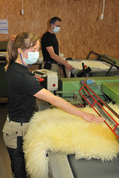 Lammfelle an der Rauhmaschine, hier werden die Schaffelle vom Spreu gereinigt. Udo Meinelt & Söhne, Rötha